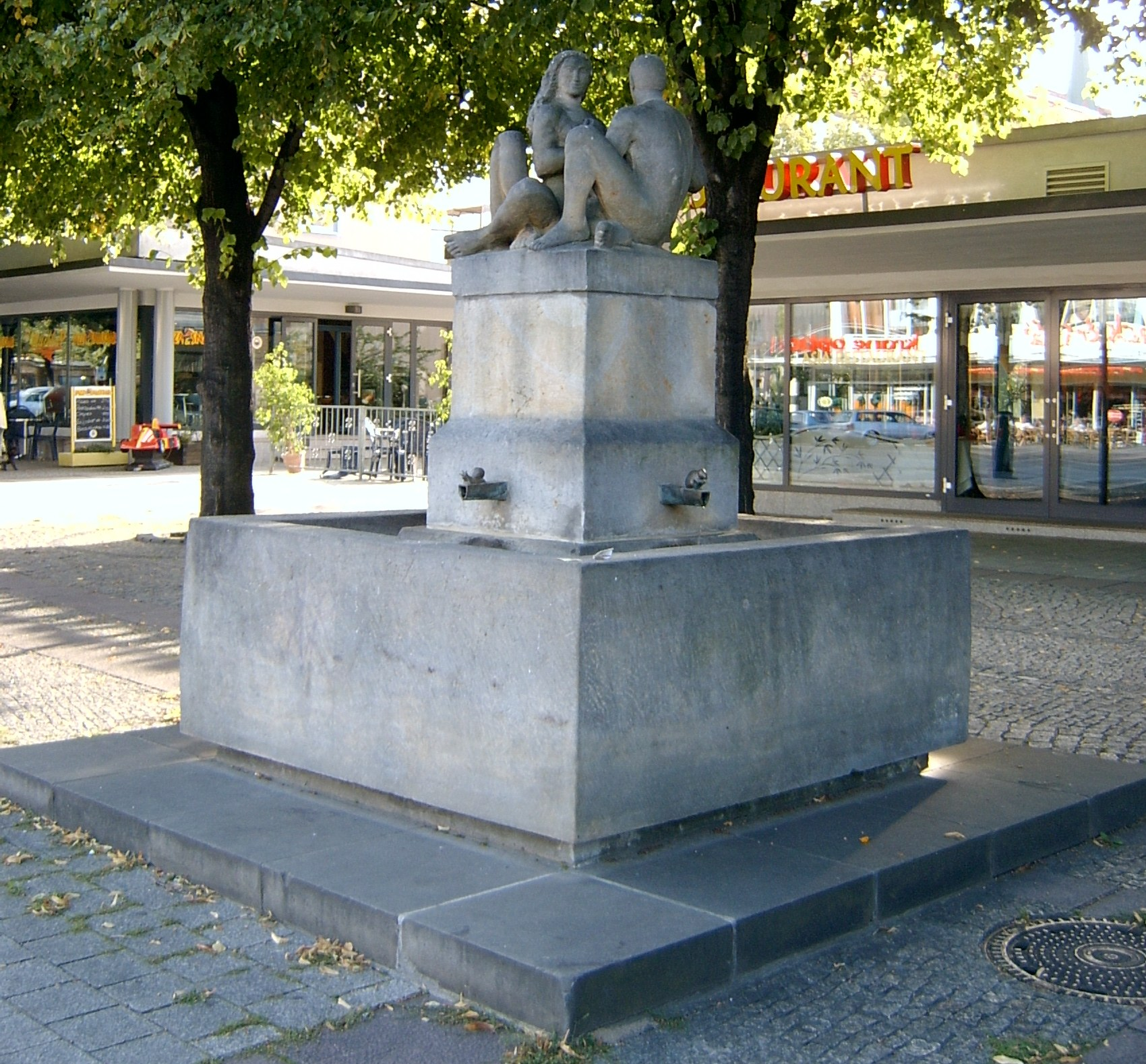 Brunnen auf der Magistrale in Frankfurt (Oder)